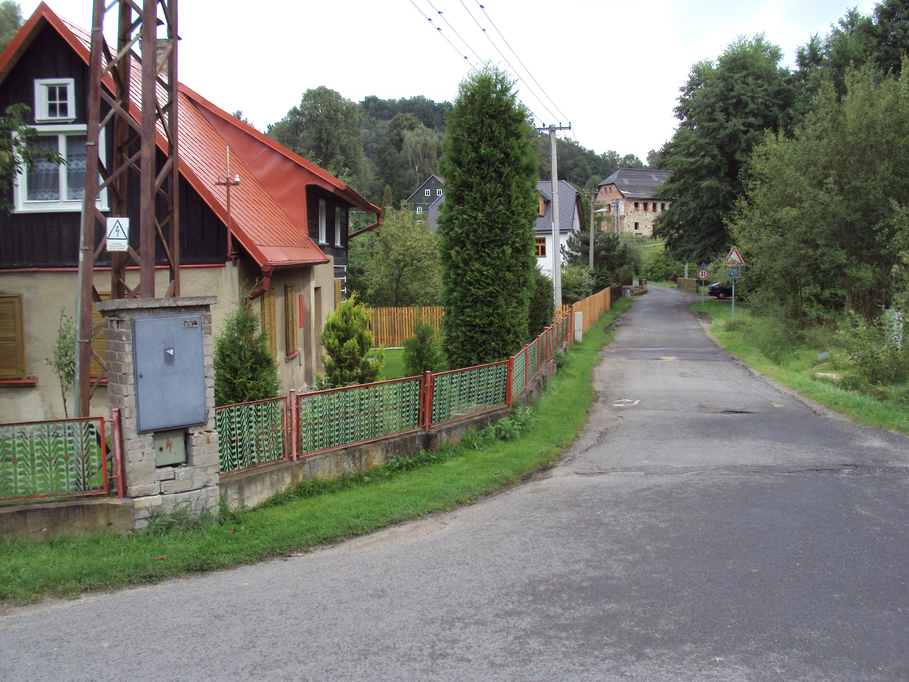 Silnice skrz obec Radvanec